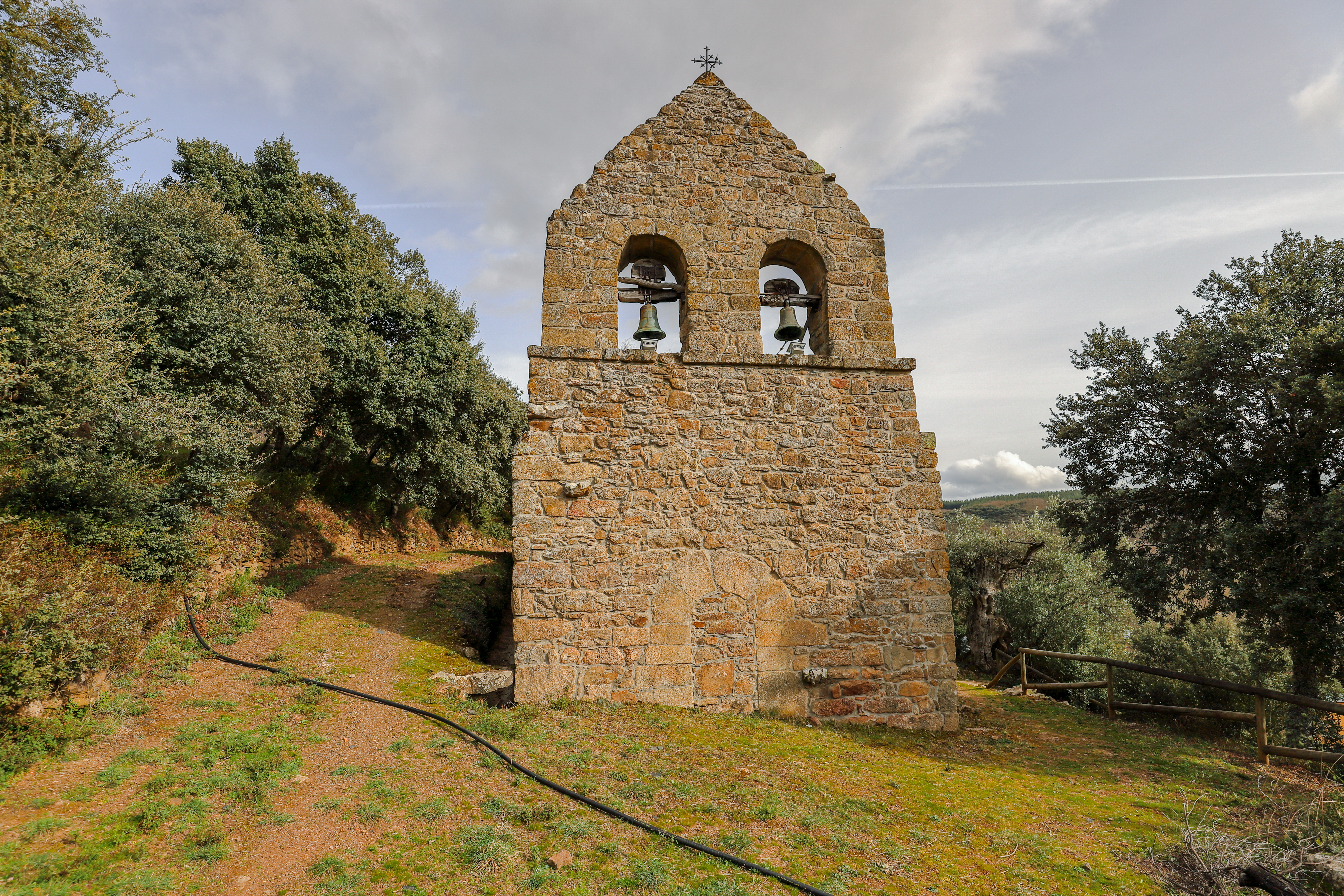 Labaniego es una localidad que pertenece al municipio de Bembibre, comarca de El Bierzo, provincia de León.